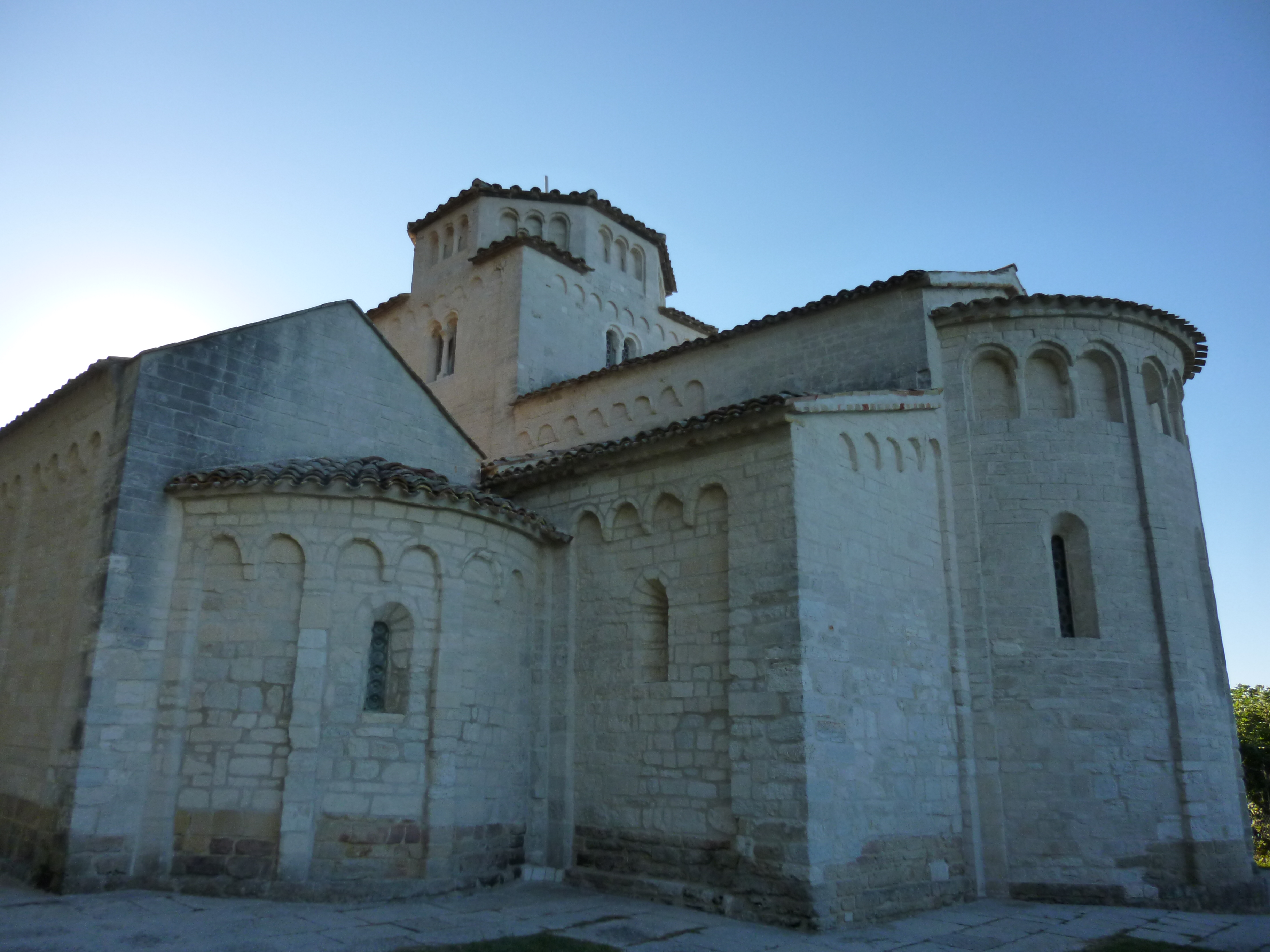 Chiesa di Santa Maria di Portonovo This is a photo of a monument which is part of cultural heritage of Italy.